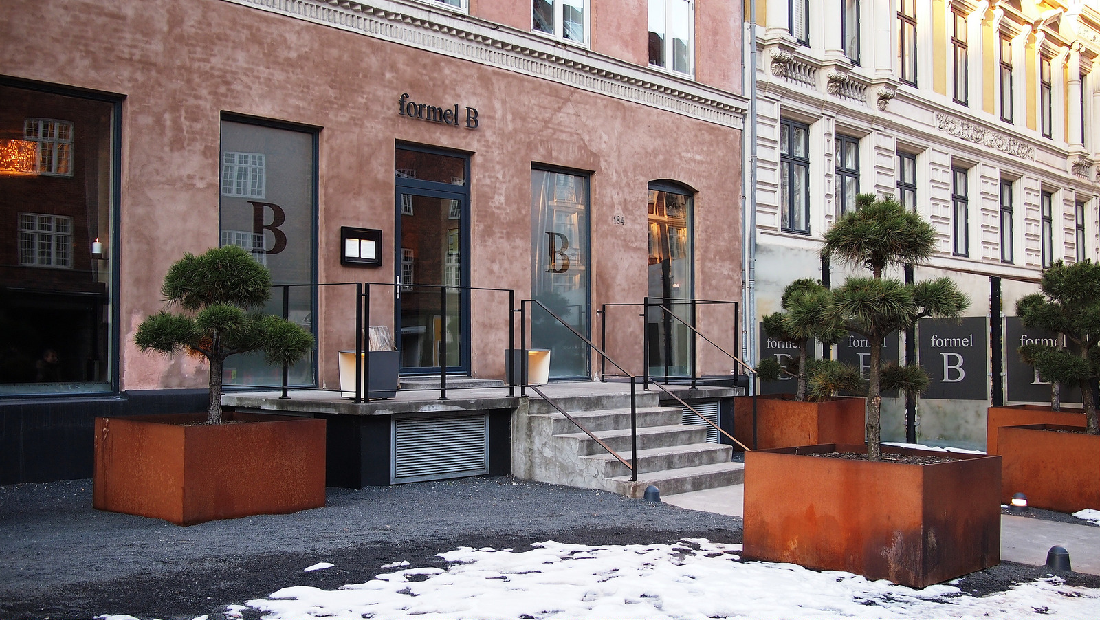 Formel B